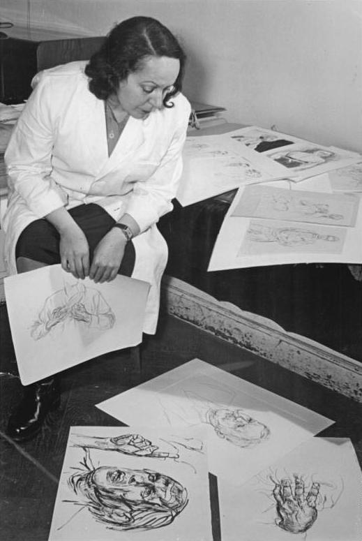 Zentralbild Höhne-Pohl 8 Motive 22.2.1955 Zum Internationalen Frauentag 1955 - Frauen als Kulturschaffende Aus der Arbeit von Professor Lea Grundig, Dresden. Frau Professor Lea Grundig hat an der Kunstakademie in Dresden den Lehrstuhl für Grafik inne. Neben ihrer beruflichen Tätigkeit ist sie Abgeordnete des Bezirktages in Dresden. UBz: Professor Grundig arbeitet an einem grafischen Zyklus der Bauernkriege. Hier wählt sie einige Skizzen für diesen Zyklus aus.